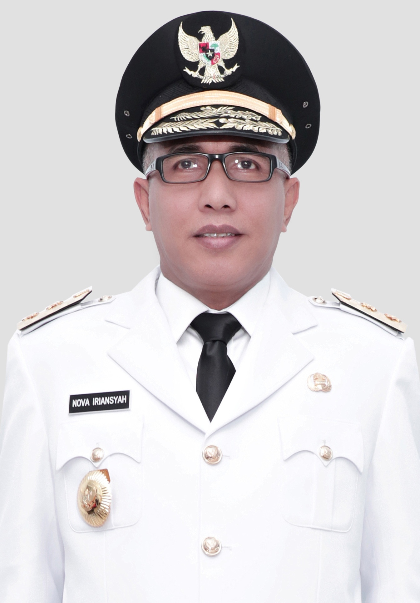 Nova Iriansyah, Wakil Gubernur Aceh periode 2017-2022 Kategori:Politikus Partai Demokrat